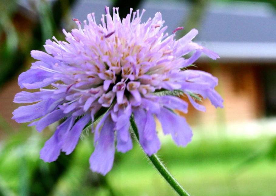 Knautia longifolia